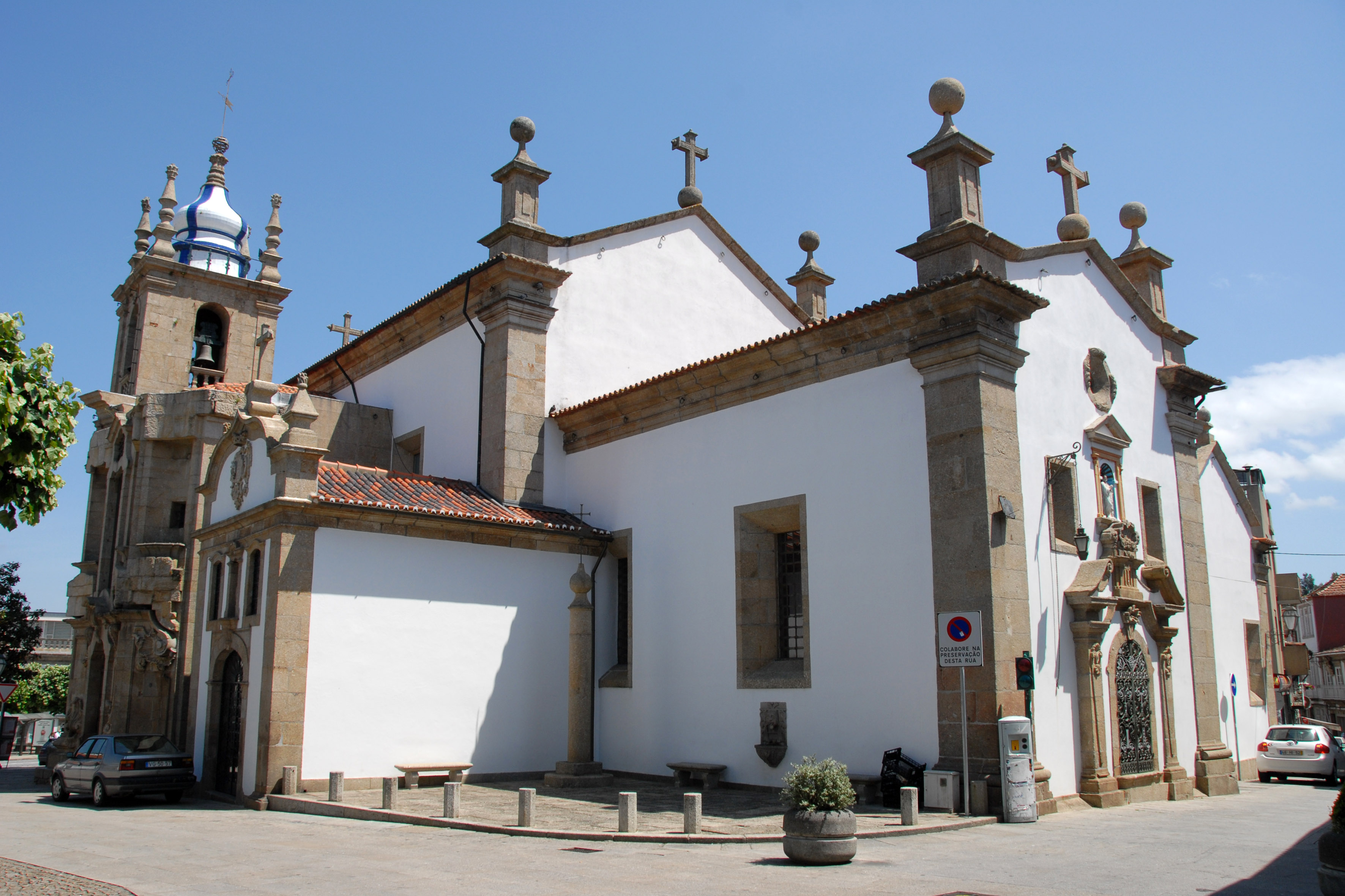 Penafiel - Igreja da Misericórdia de Penafiel This file was uploaded for Wiki Loves Monuments in Portugal with the unique identifier 72938.